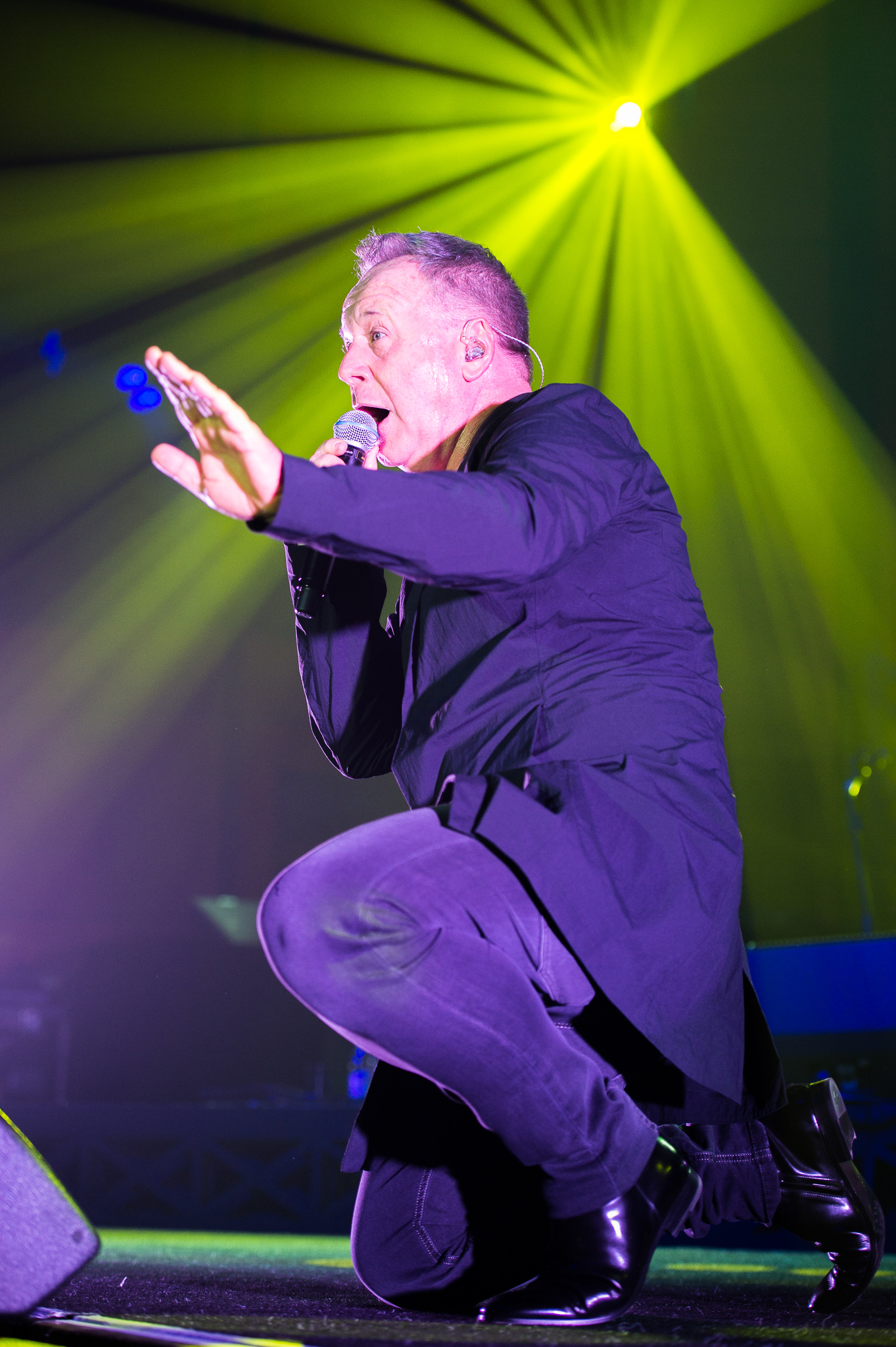 Acoustic Live Tour,Concertbüro Franken,Jim Kerr,Konzert,Livekonzert,Livemusik,Meistersingerhalle,Simple Minds